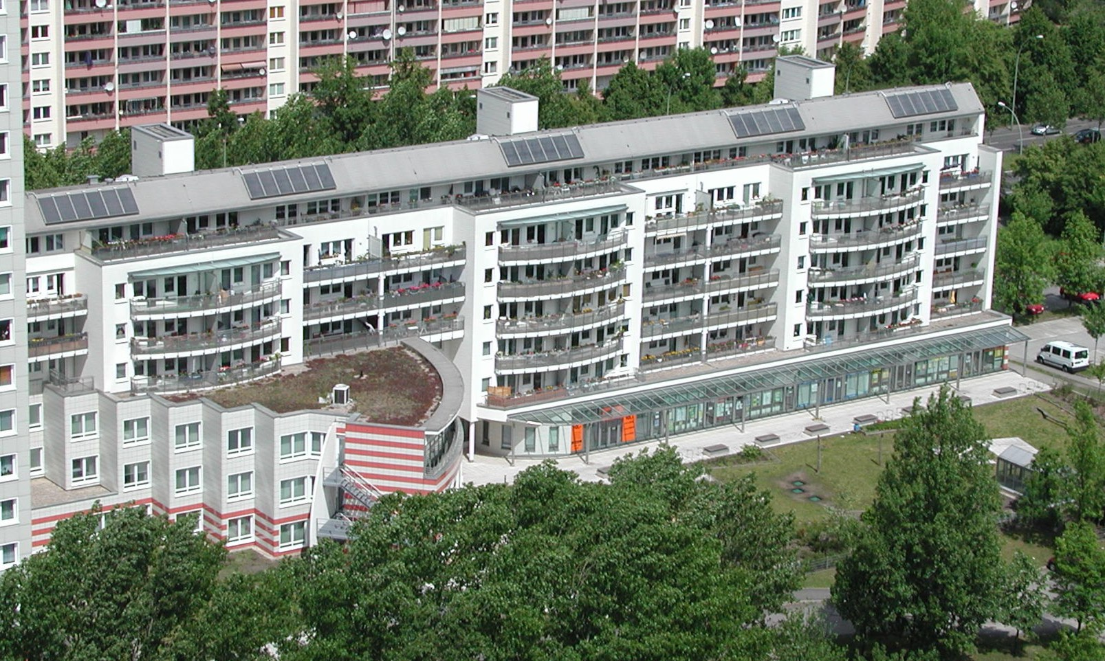 Das Geschäftshaus der WGLi mit Eigentumswohnungen und Läden